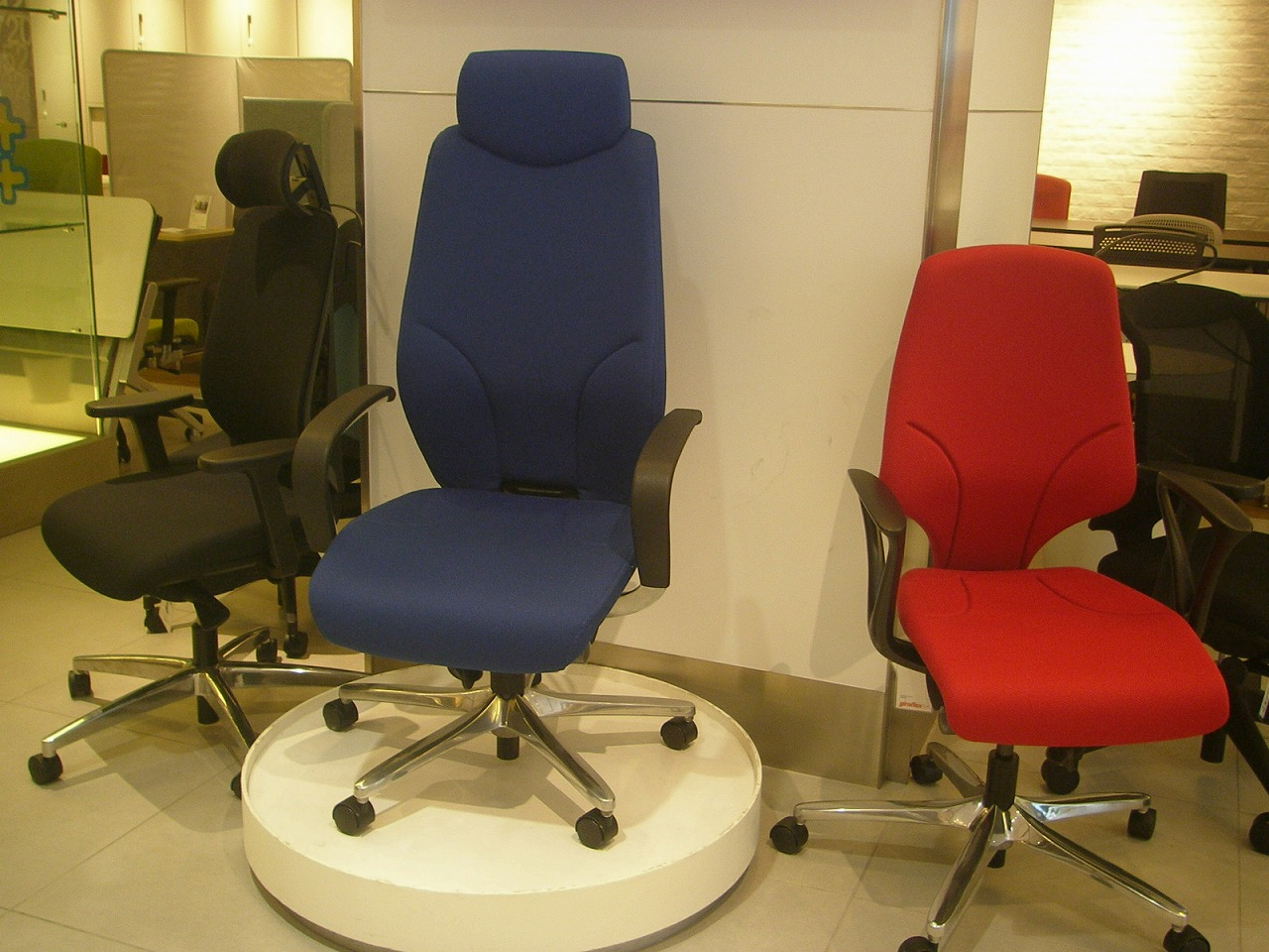 at PLUS Tokyo Showroom,giroflex chair